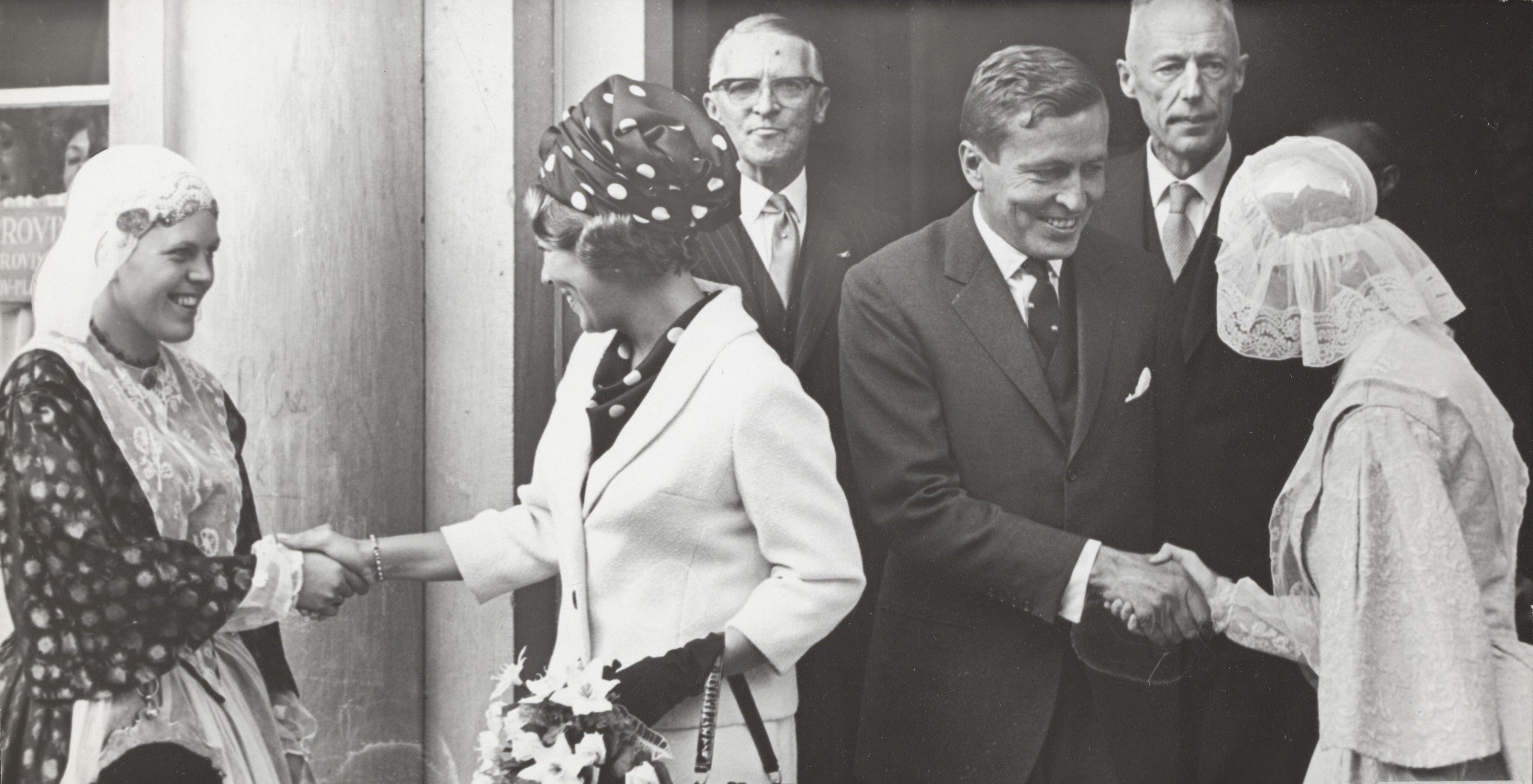 Henri Peter (Harry) Linthorst Homan (met bril), A.A.M van der Meulen (burgemeester van Leeuwarden), prinses Beatrix, prins Claus en twee vrouwen in Friese klederdracht. Leeuwarden, Friesland, sept. 1965